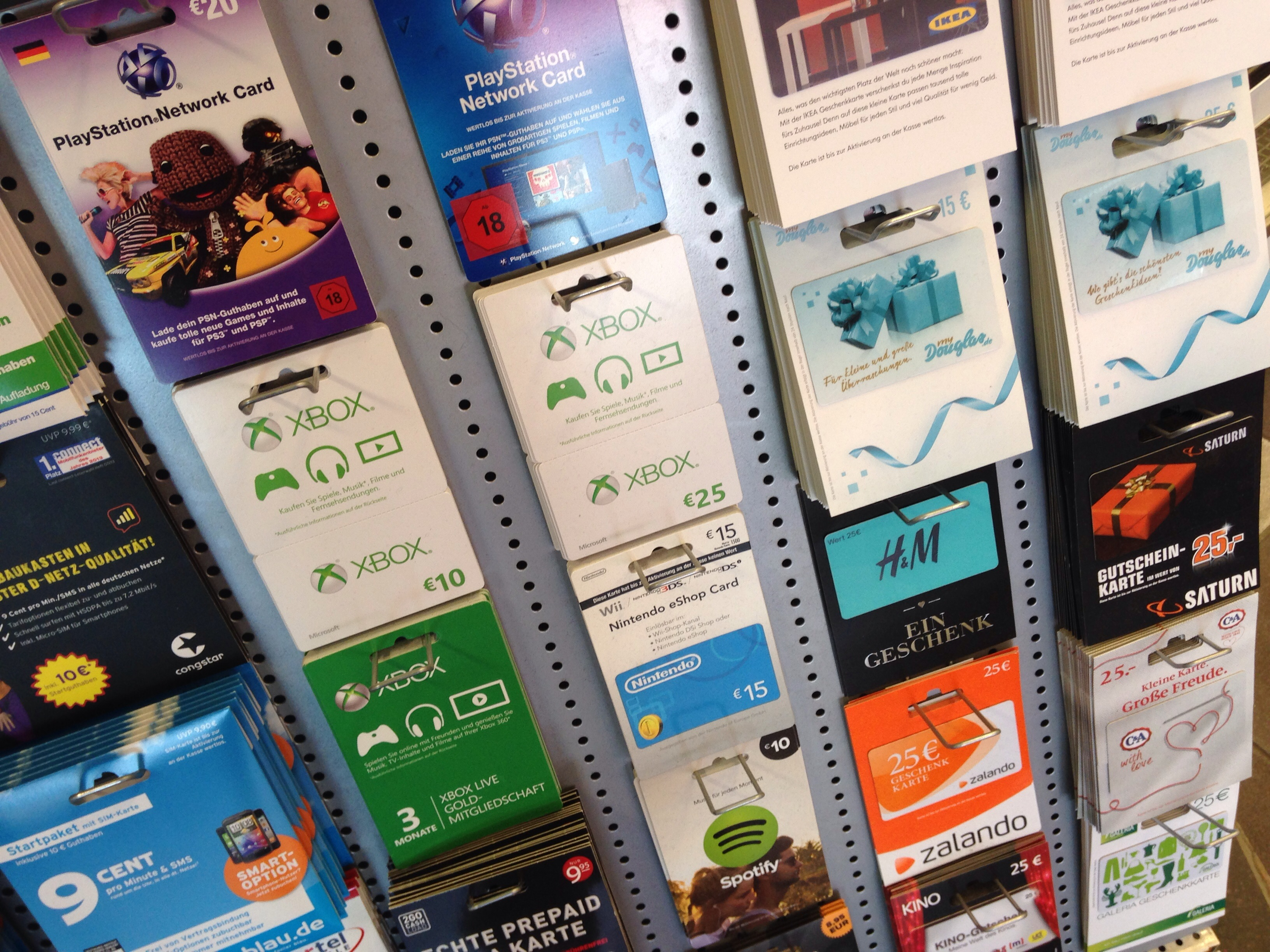 Gutscheinkarten